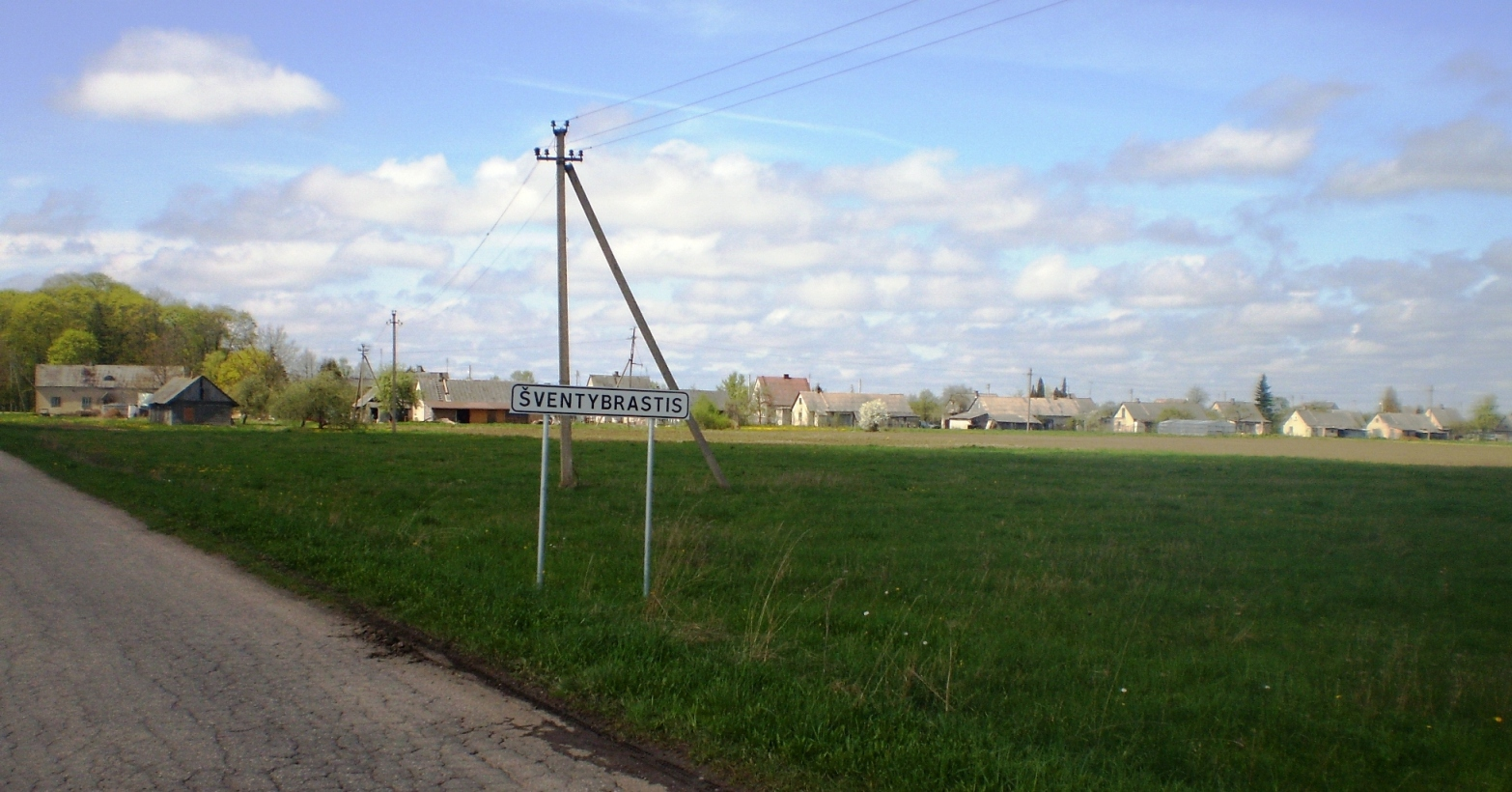 Švenybrastis, Kėdainių raj.